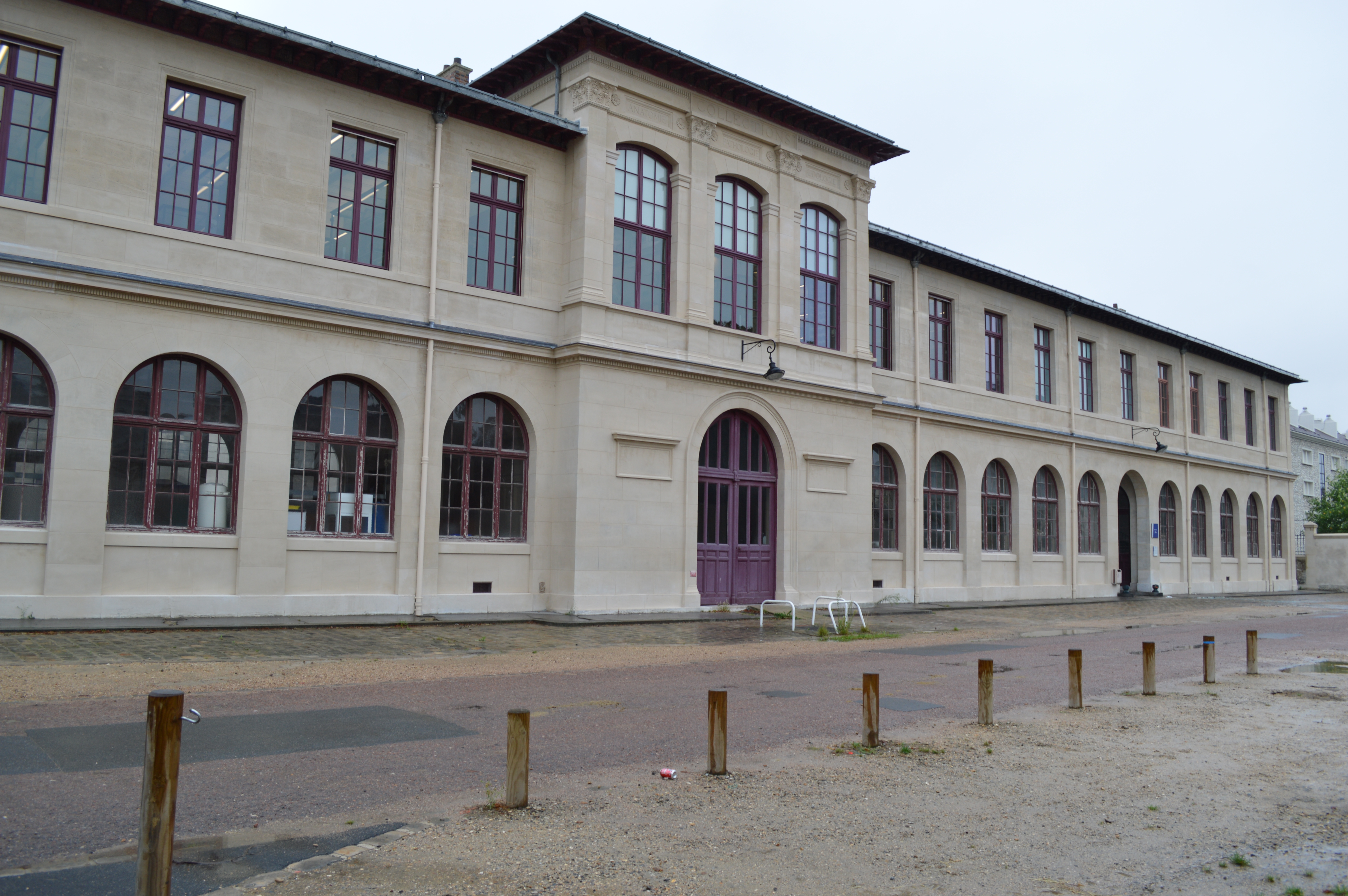 La façade Nord du bâtiment du musée Fragonard après son ravalement en 2013.